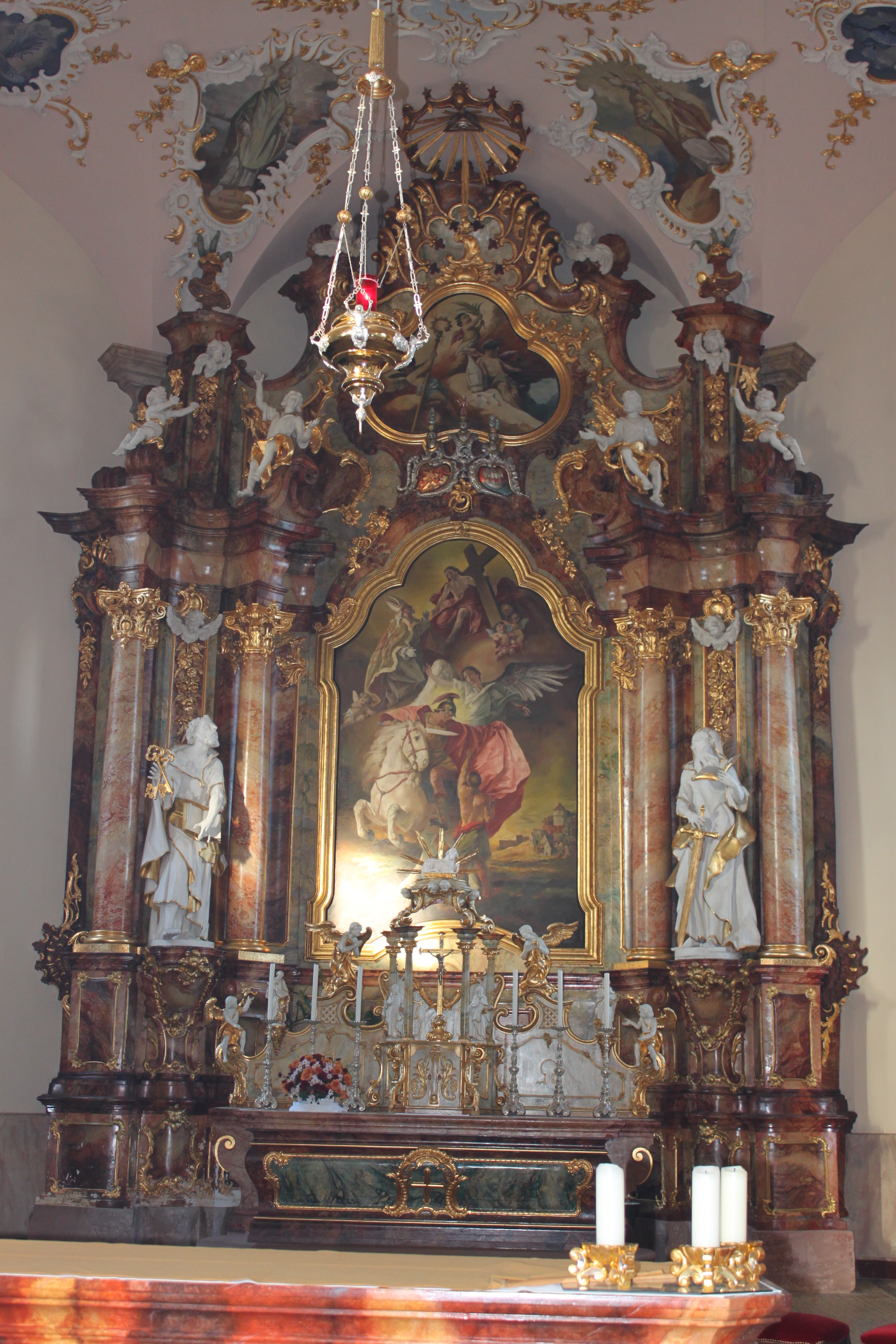 Hochaltar in der Pfarrkirche St.Martin in Riegel am Kaiserstuhl